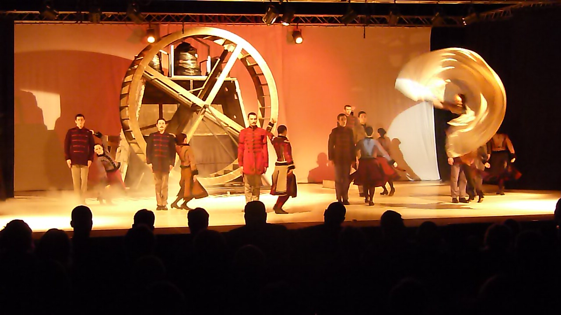 Live on the 14th of February, 2015. Budapest, Várkert Bazár. Gábor Áron - Háromszék Dance Ensemble. Director and choreographer: Orza Călin. II. Budapest Székely Ball. A felvételek 2015. február 14-én készültek Budapesten, a Várkert Bazárban. II. Budapesti Székely Bál. Gábor Áron táncdráma - Háromszék Táncegyüttes.